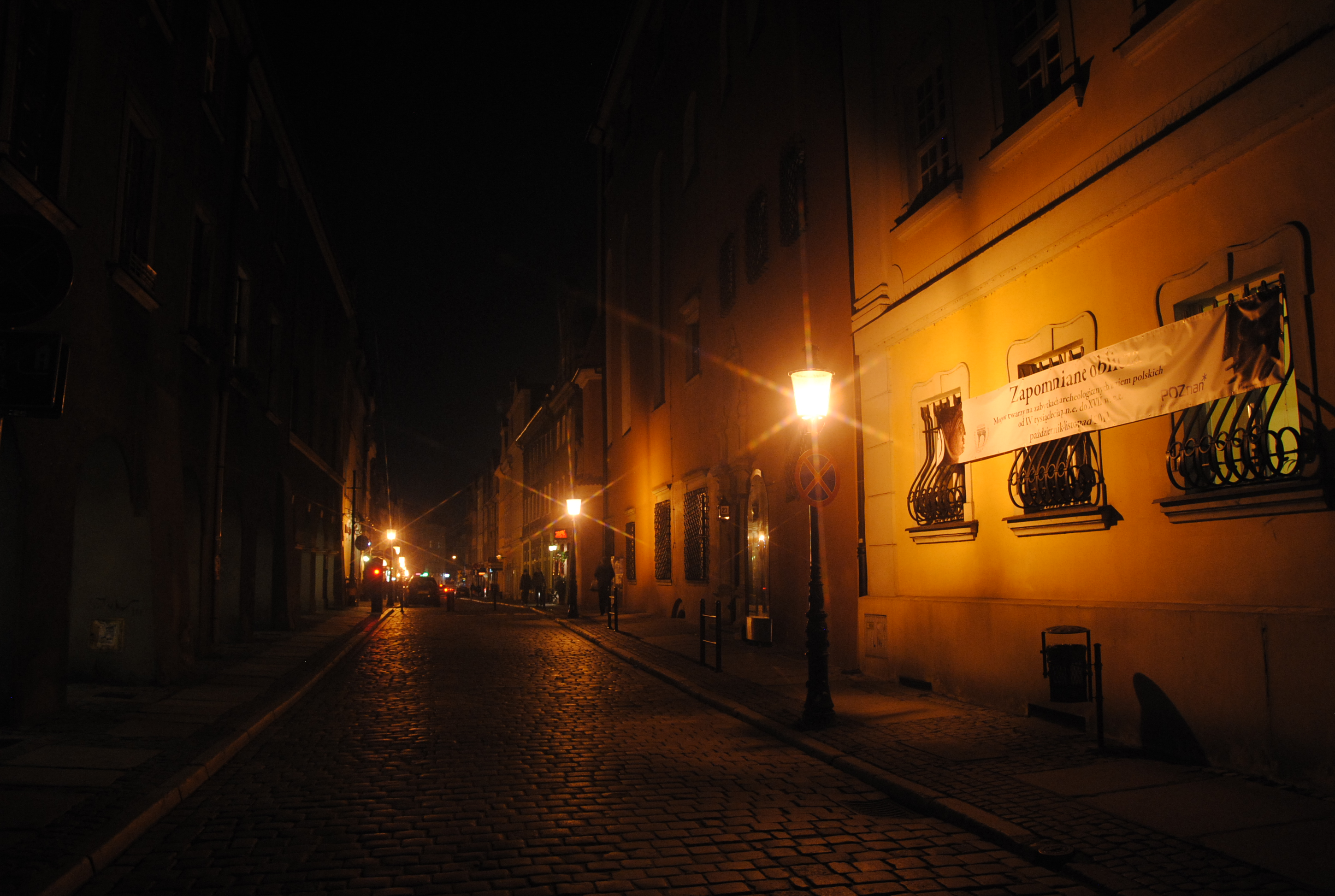 Poznań, Polônia.